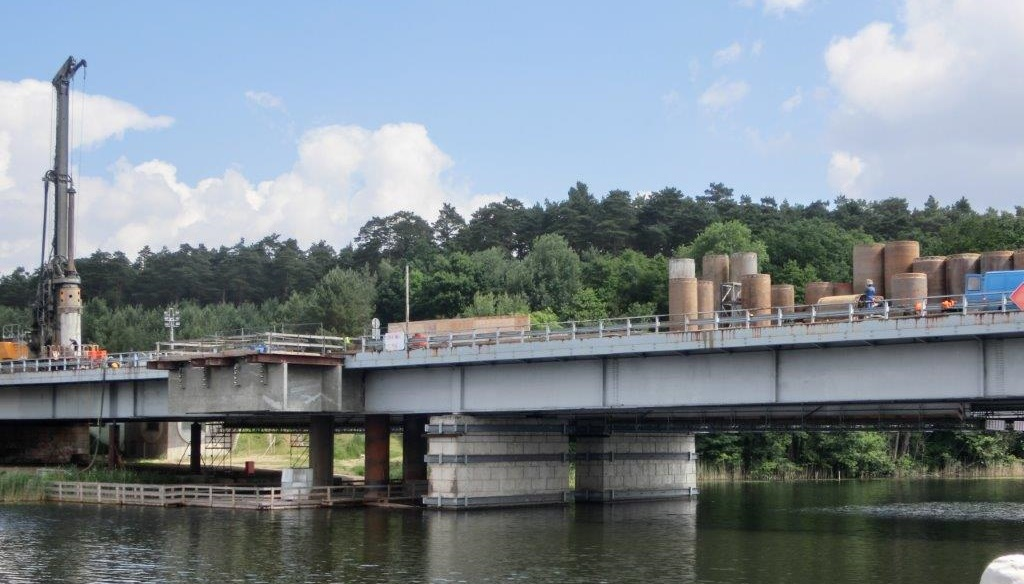 Erneuerung der Brücke über den Petersdorfer See (Bundesautobahn 19)